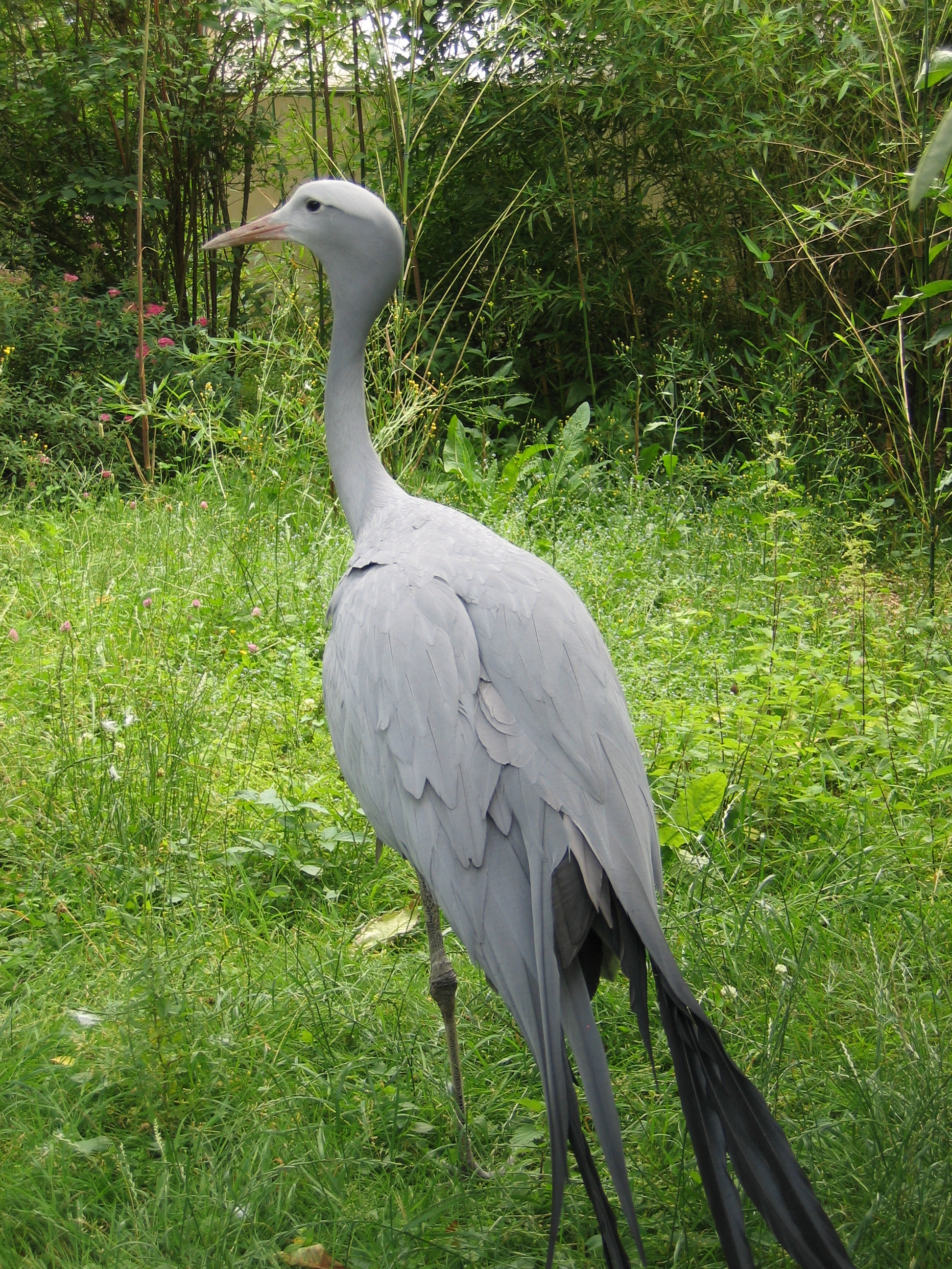 Ein Paradieskranich im Zoo Neuwied